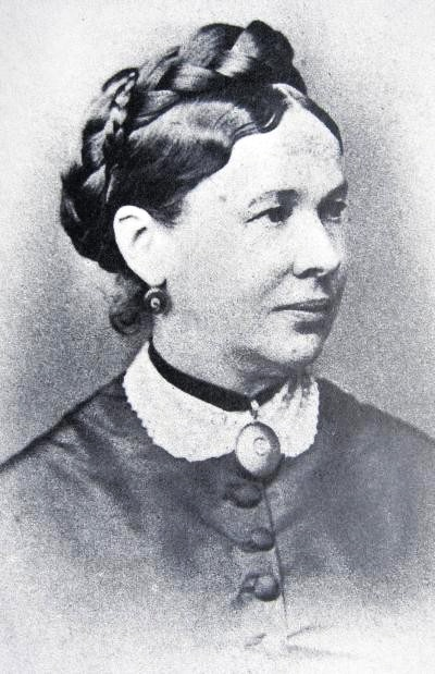 Sybilla von Leonrod geb. Meilhaus (1814-1881), Erzieherin von König Ludwig II. von Bayern